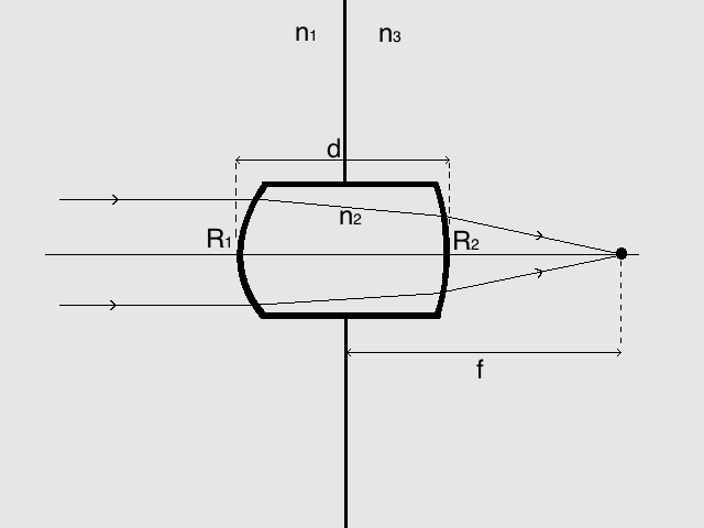 Läätsevalmistaja valemis kasutatavad tähised